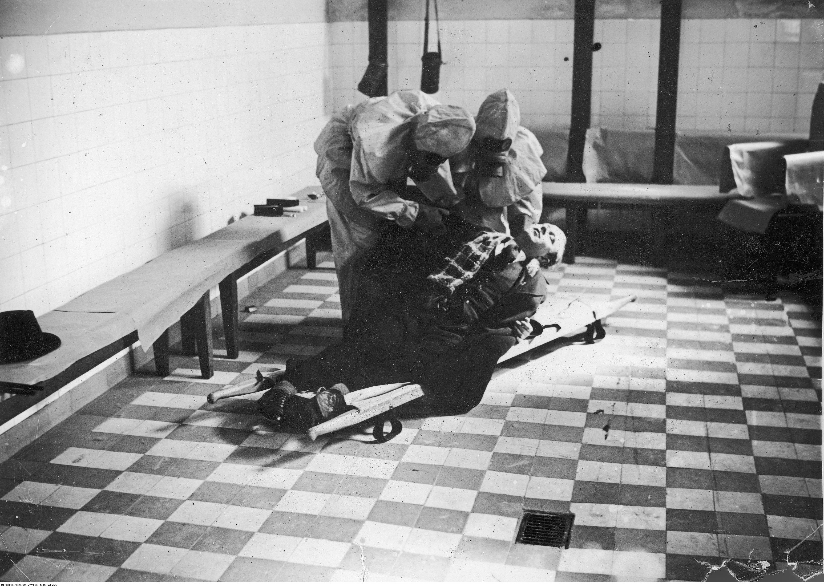 Ćwiczenia w udzielaniu pomocy osobie wystawionej na działanie trujących gazów. Osoby wyposażone w maski przeciwgazowe wz. 24 (maska R.S.C.)